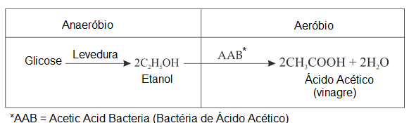 Bioquímica da produção do vinagre com separação entre etapas anaeróbias e aeróbias.